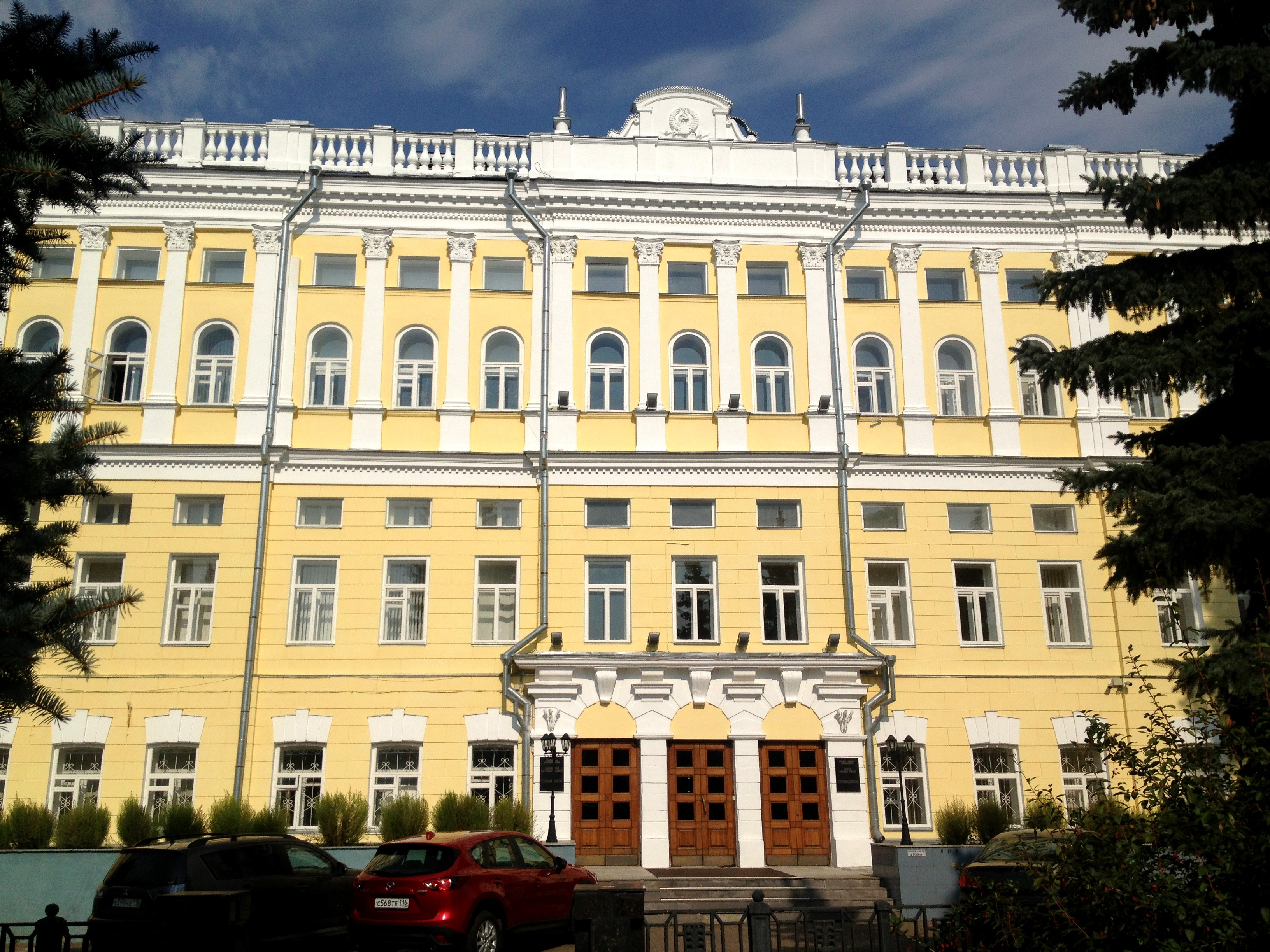 Здание ксенинской гимназии: улица Лобачевского, 2/31, Казань, Татарстан